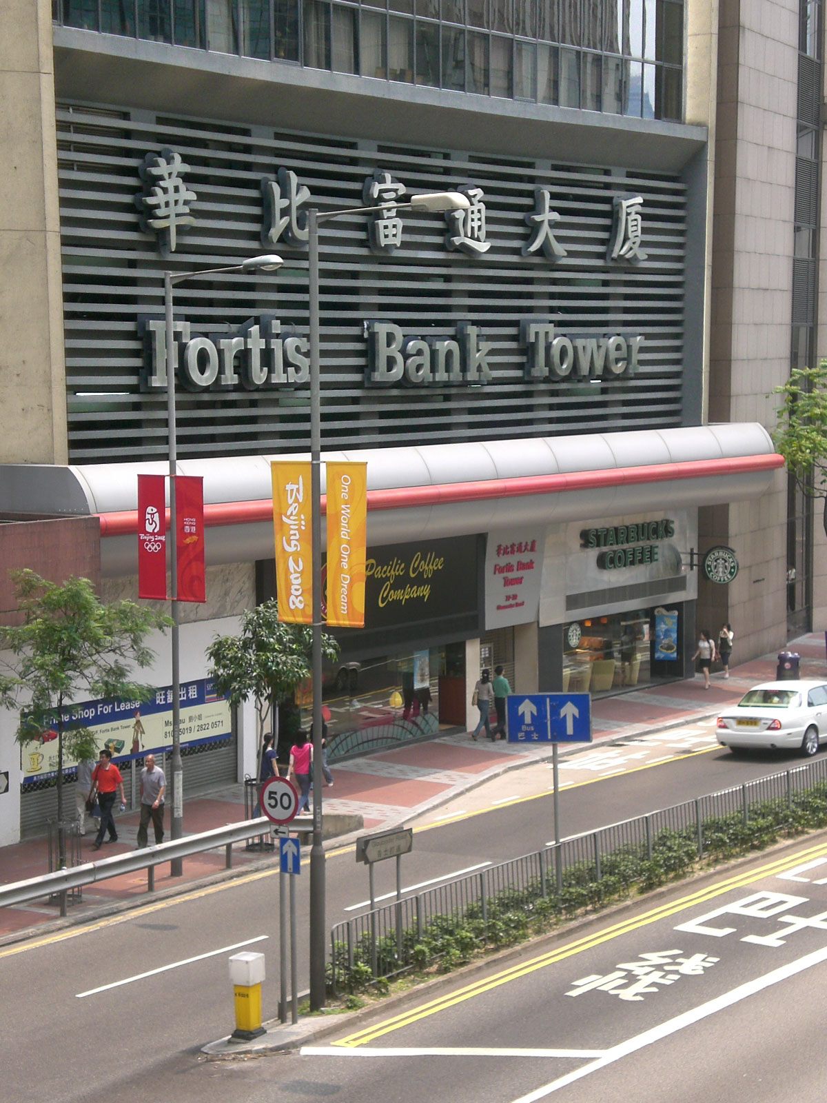 灣仔告士打道